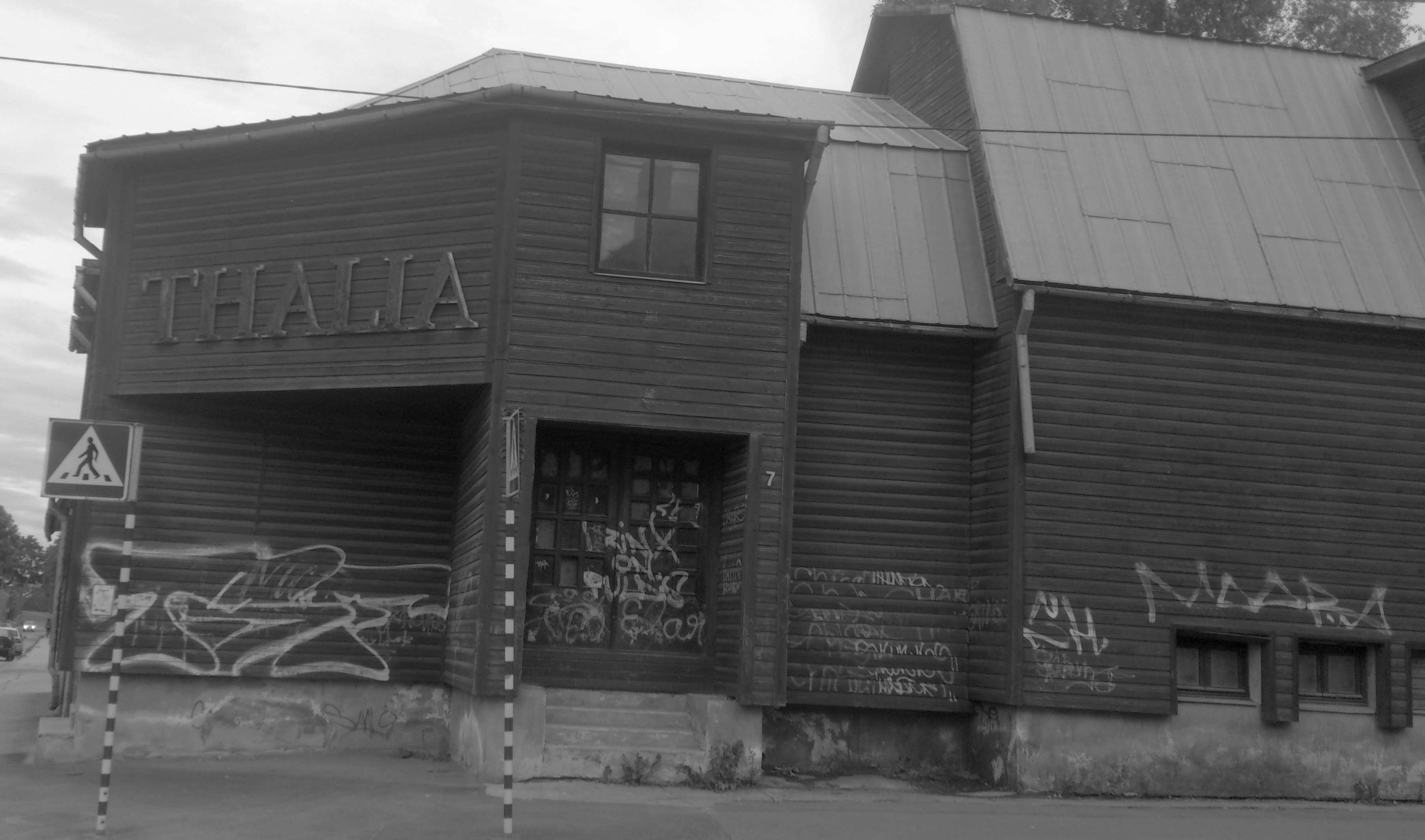 Endine Thalia videokino Tartus Karlovas Aleksandri ja Aida tänava nurgal, vaade Aida tänava poolsele küljele, 22. juuni 2015